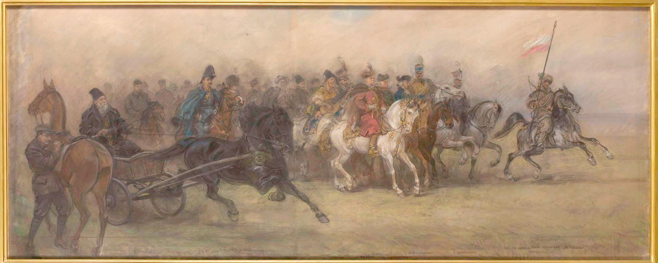 Szkic do obrazu przedstawiającego polskich malarzy scen batalistycznych, tworzących od końca XVIII do lat 20. XX wieku. Na obrazie przedstawieni są m.in.: Aleksander Orłowski (we wschodnim stroju), January Suchodolski, Piotr Michałowski (obaj w mundurach napoleońskich), Józef Brandt (w stroju Kozaka), Maksymilian Gierymski (w rokokowym kostiumie nawiązującym do przedstawianych przez malarza scen polowań), Juliusz Kossak, Józef Chełmoński (powożący zaprzęgiem), Alfred Wierusz Kowalski, Wojciech Kossak. Wizerunek samego autora, Czesława Tańskiego, widnieje w lewym dolnym rogu obrazu, w pozie obserwatora kawalkady. Na dole obrazu biegnie napis z nazwiskami przedstawionych malarzy: J. CHEŁMOŃSKI; J. KOTOWSKI; W. KOSSAK; J. ROSEN; J. RYSZKIEWICZ; A.W. KOWALSKI; S. MASŁOWSKI; J. BRANT [sic!]; St. WOLSKI; H. PILLATI; J. KOSSAK; J. BRODOWSKI; M. GIERYMSKI; P. MICHAŁOWSKI; J. SUCHODOLSKI; A. ORŁOWSKI.